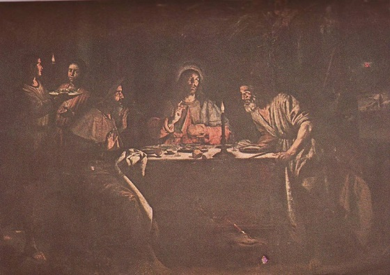 "Cena in Emmaus", olio su tela, Chiesa dell'Annunziata, Levanto, Italia